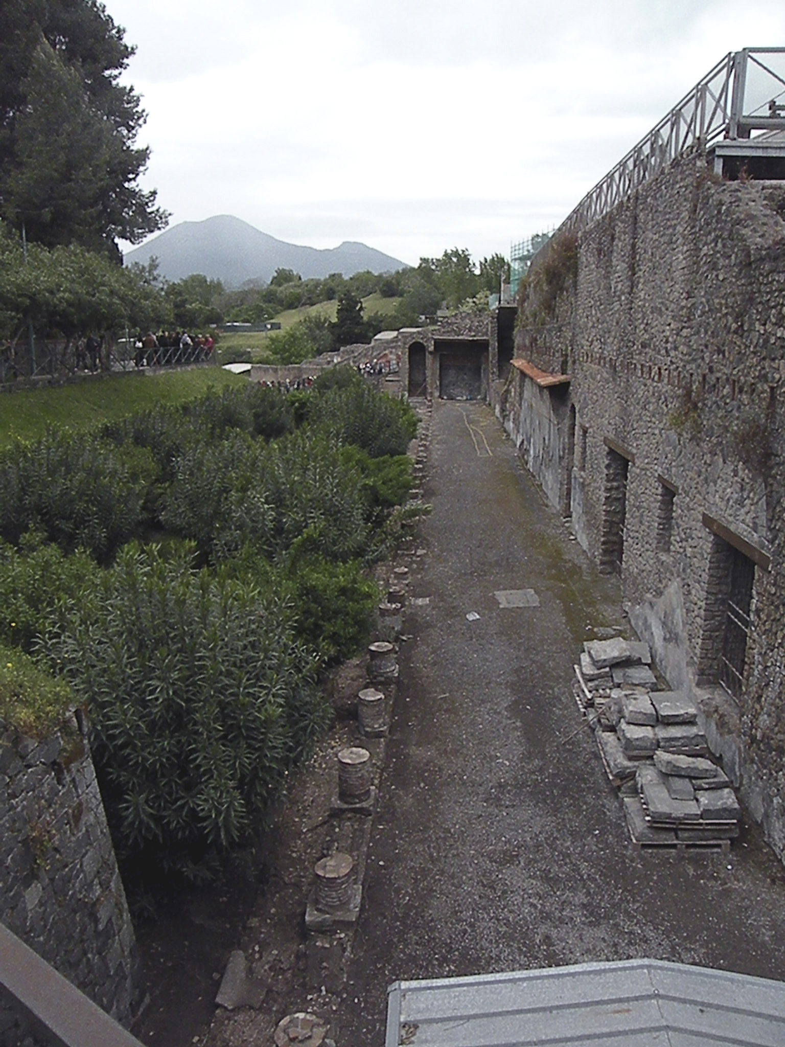 Pompeii, Villa fuori Porta Marina. La Villa, in cattive condizioni, è stata costruita a ridosso e sulle mura di difesa della città quando queste oramai non erano più necessarie dopo la conquista romana dell'Italia. Le mura della città si riconoscono in particolare nella parete di fondo del porticato, alla fine di esso. Везувий и городская стена Помпей